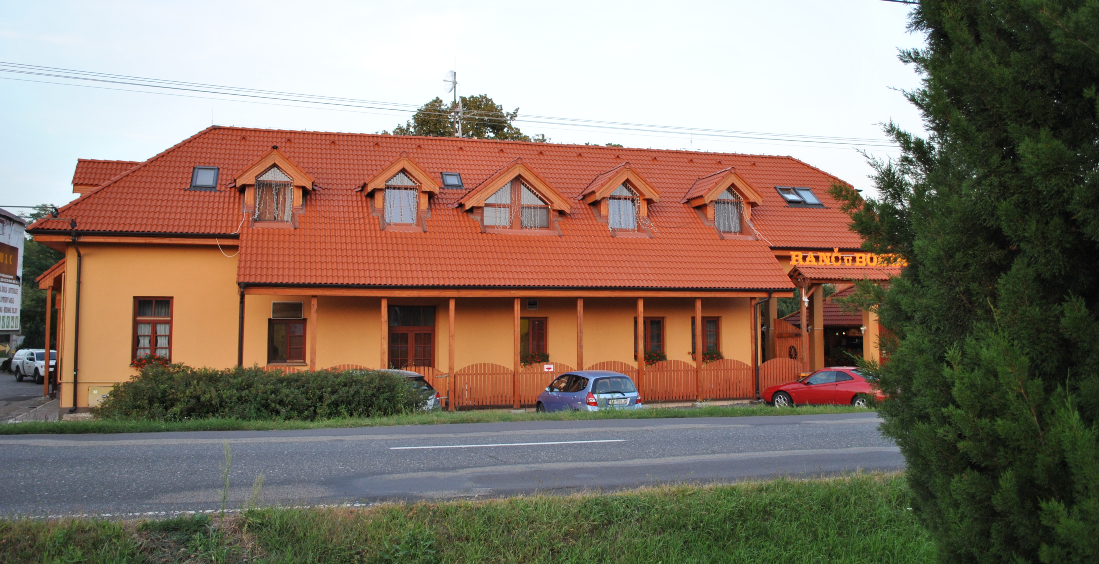 Újbars